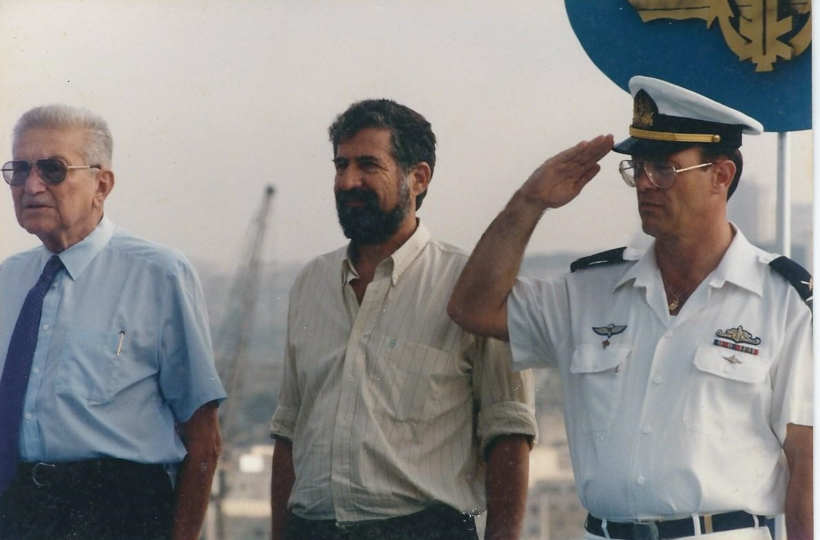 קבלת פנים לקורבטה טילים דגם סער 5 משמאל לימין נשיא המדינה עזר ויצמן, ראש העיר חיפה עמרם מצנע ומפקד מנהלת להב דולפין ,תא"ל אלכס אייל